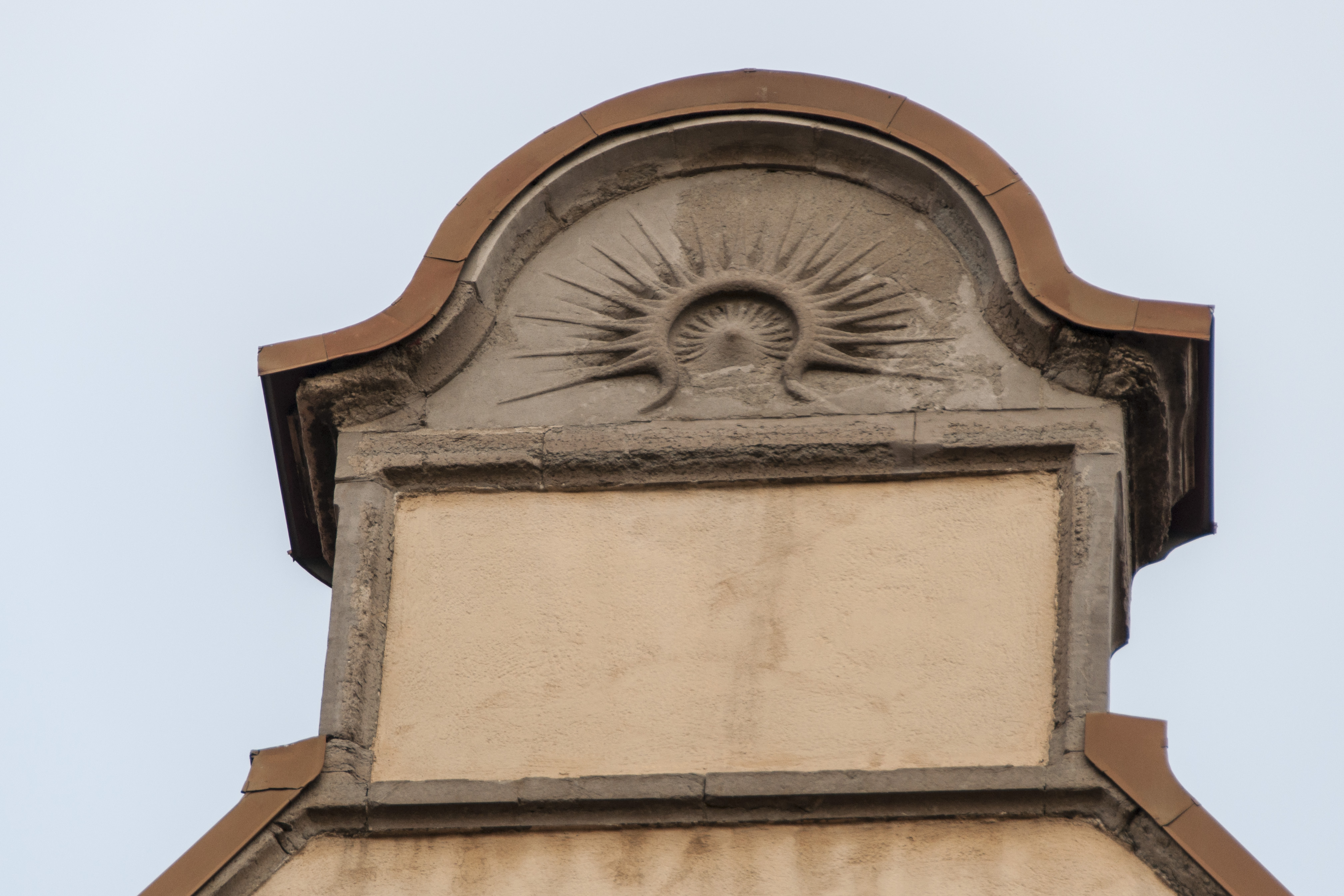 Solhemmet vid Sophiahemmet. Byggnadsår 1907. Arkitekt Ferdinand Boberg